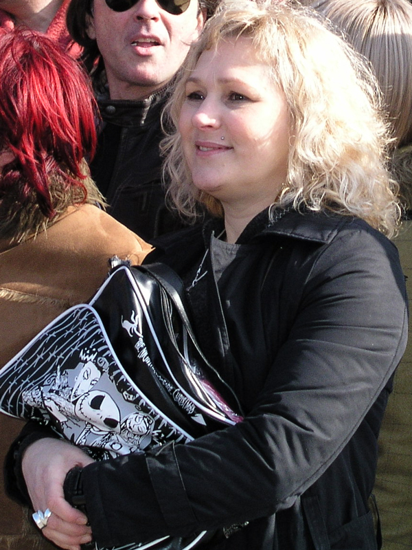 Marina Perazić, "Riječki novi val" u Kontu, Rijeka, Hrvatska